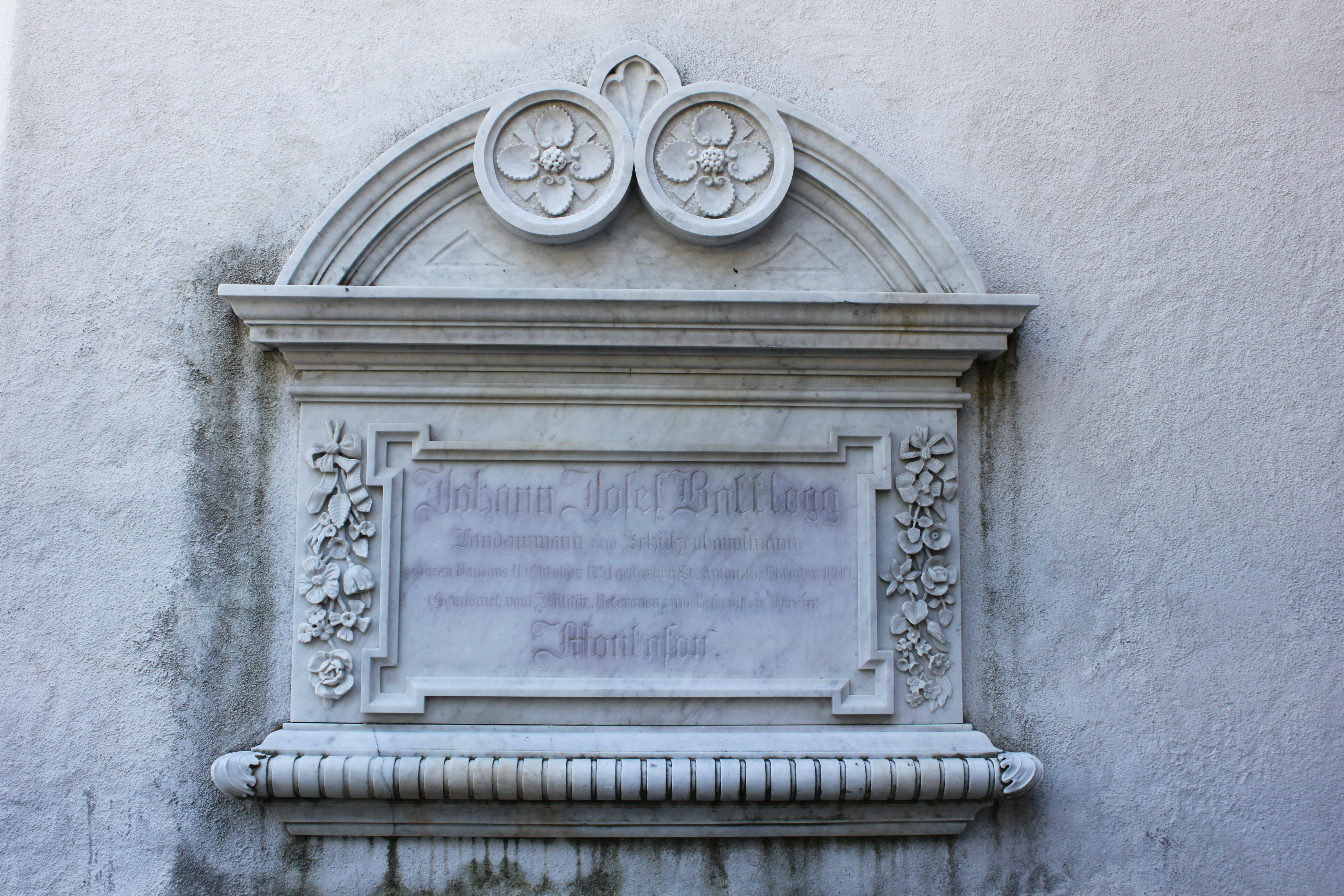 Kath. Pfarrkirche hl. Antonius Eremit mit Friedhof